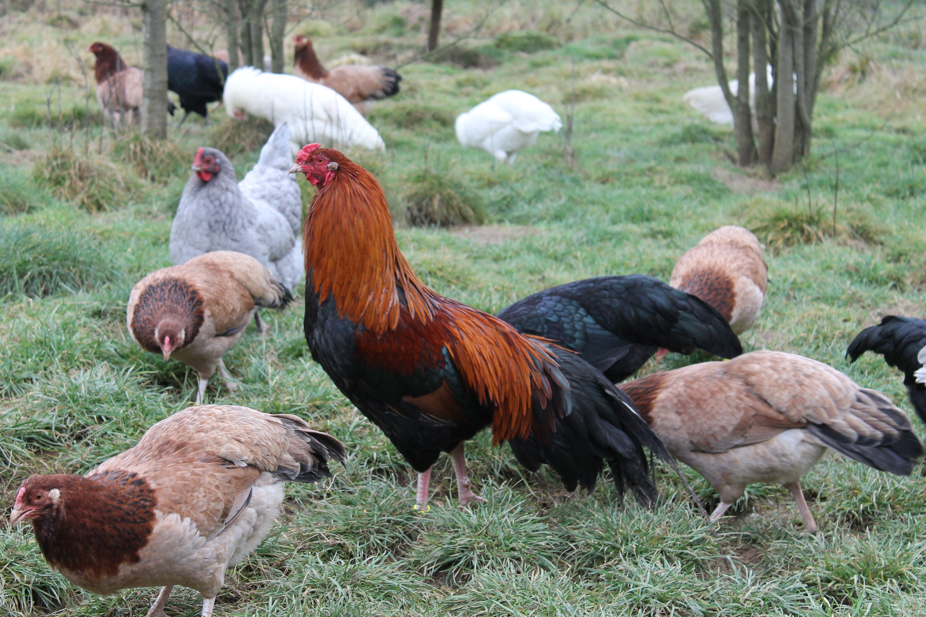 Cubalaya in verschiedenen Farbschlägen, Foto: Kruppert